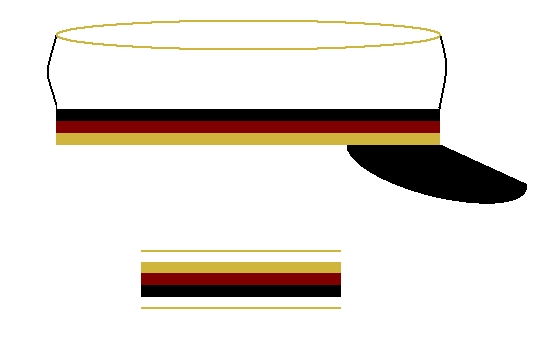 Couleur der Jenaischen Burschenschaft Germania